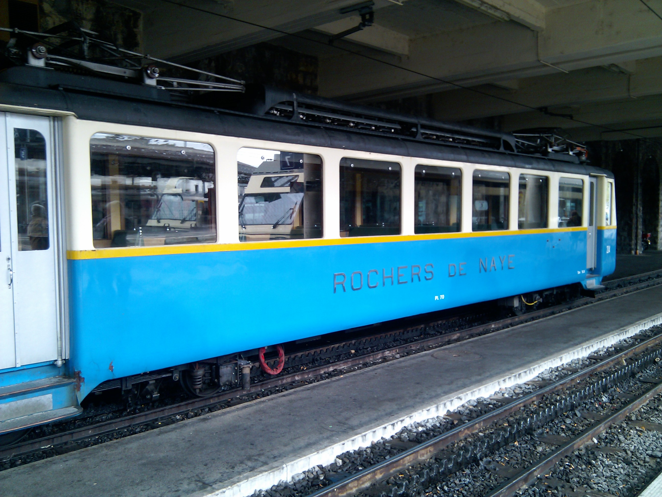 Chemin de fer Montreux - Glion - Rochers-de-Naye